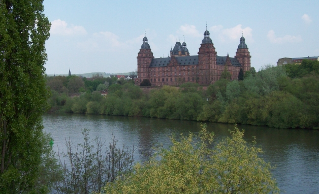 Aschaffenburger Schloss (Standort des Schwedenkönigs mit Kapuzinerkloster (Kl.Türmchen,links))